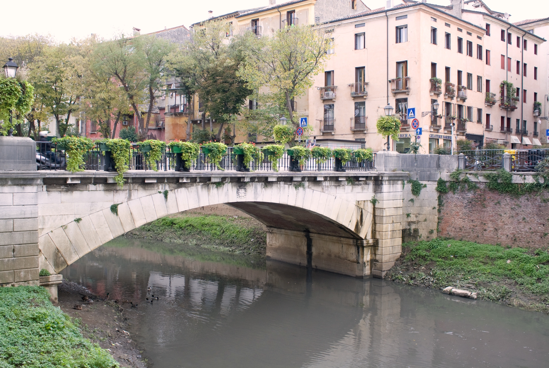 Vicenza - Ponte San Paolo (ricostruito a fine 800)